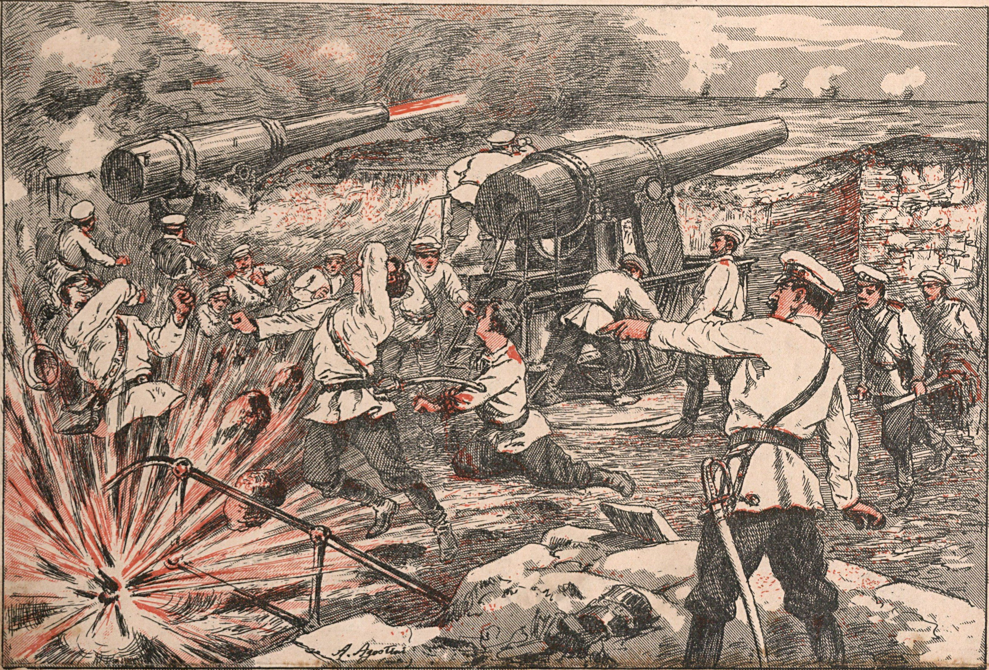 GUERRA RUSSO-JAPONESA. Episódios da defesa de Porto Arthur. Uma bateria russa em combate, no momento de rebentar uma granada atirada pela esquadra sob o comando do almirante Togo.